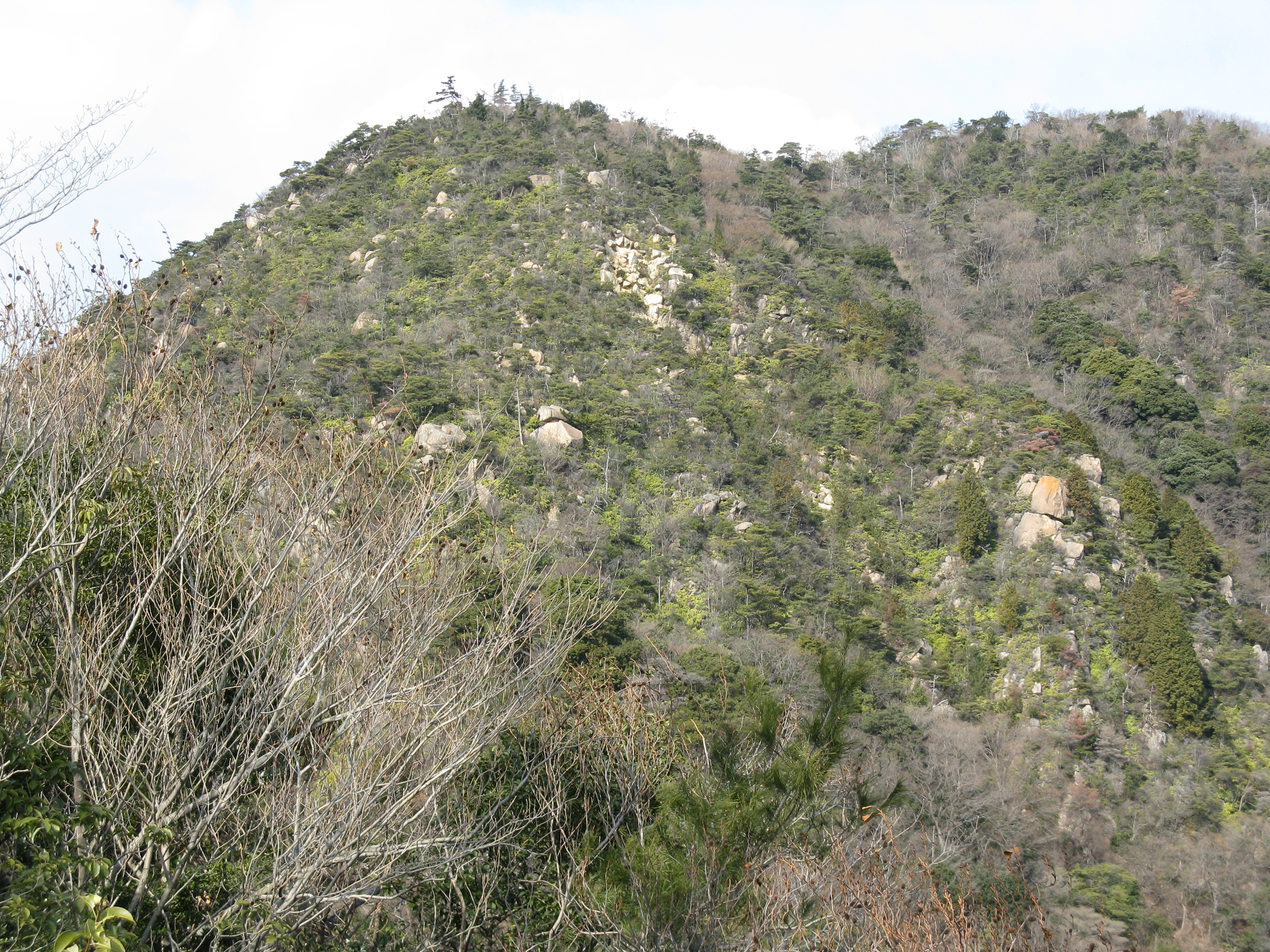 荒地山